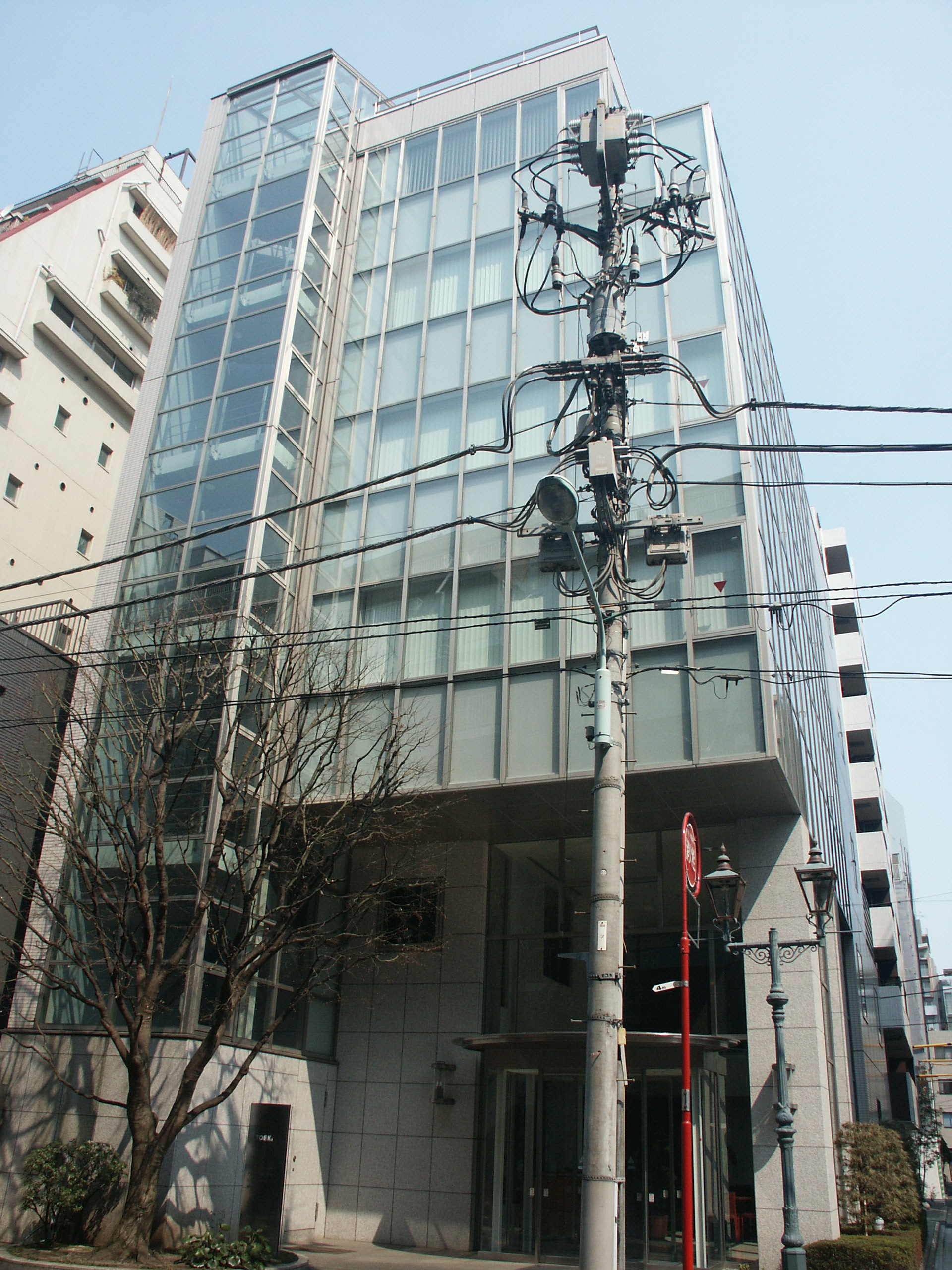 東部液化石油株式会社 本社